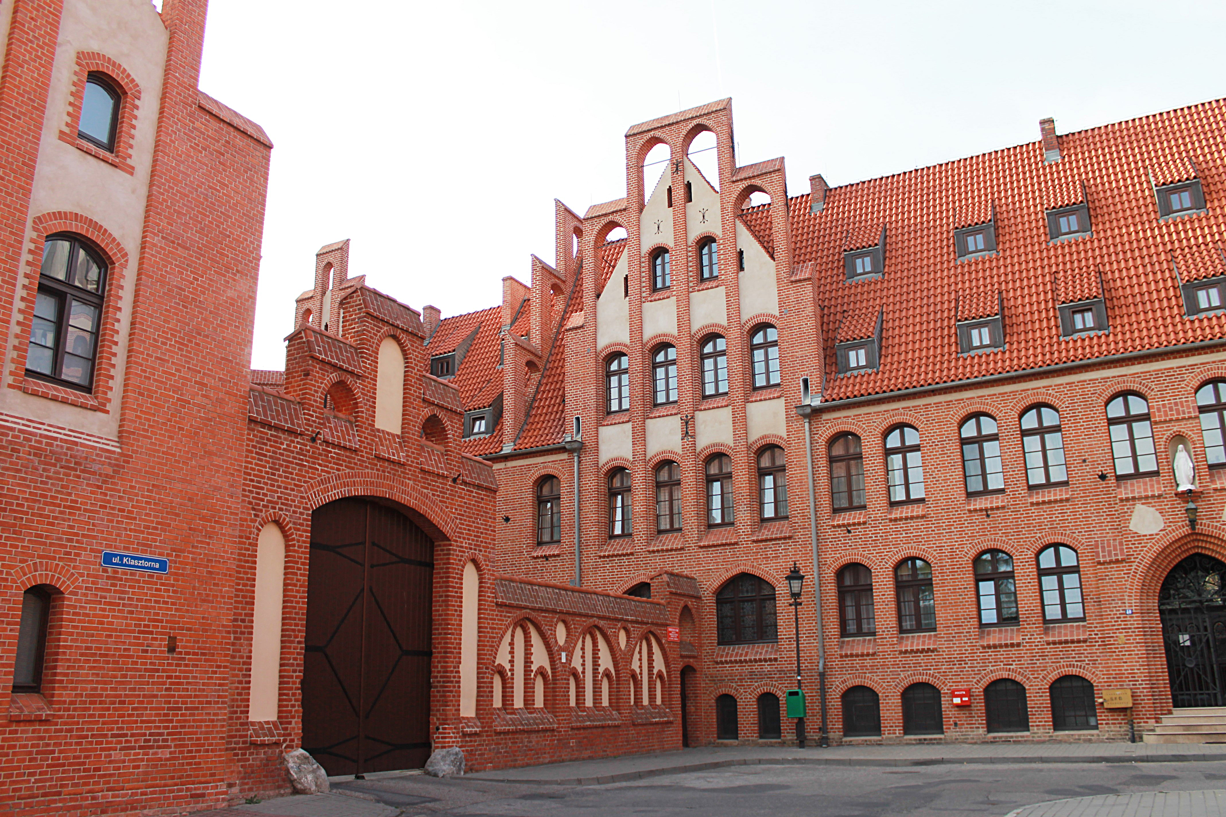 Chełmno, zespół klasztorny benedyktynek, ob. ss. Miłosierdzia św. Wincentego á Paulo